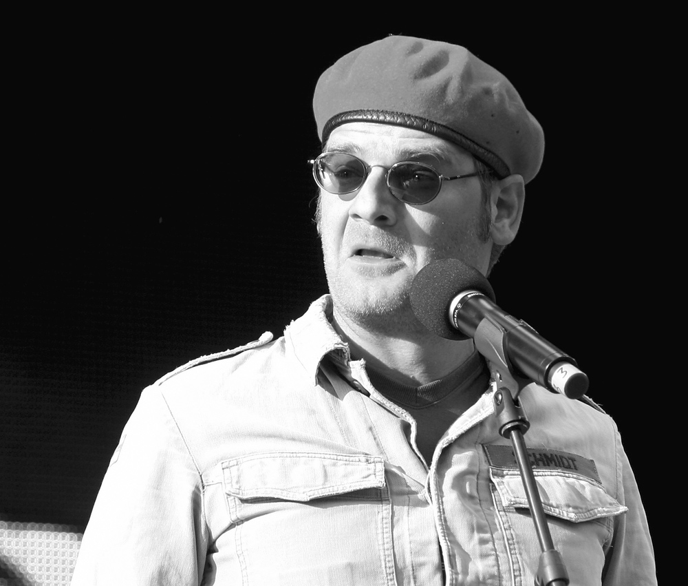 Holger Müller alias Ausbilder Schmidt bei einem Night-Wash-Freiluft-Auftritt